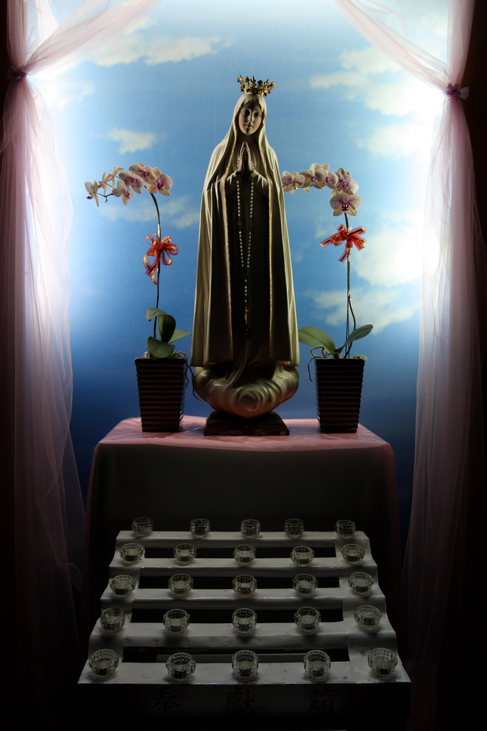 輔大淨心堂 聖堂聖母像